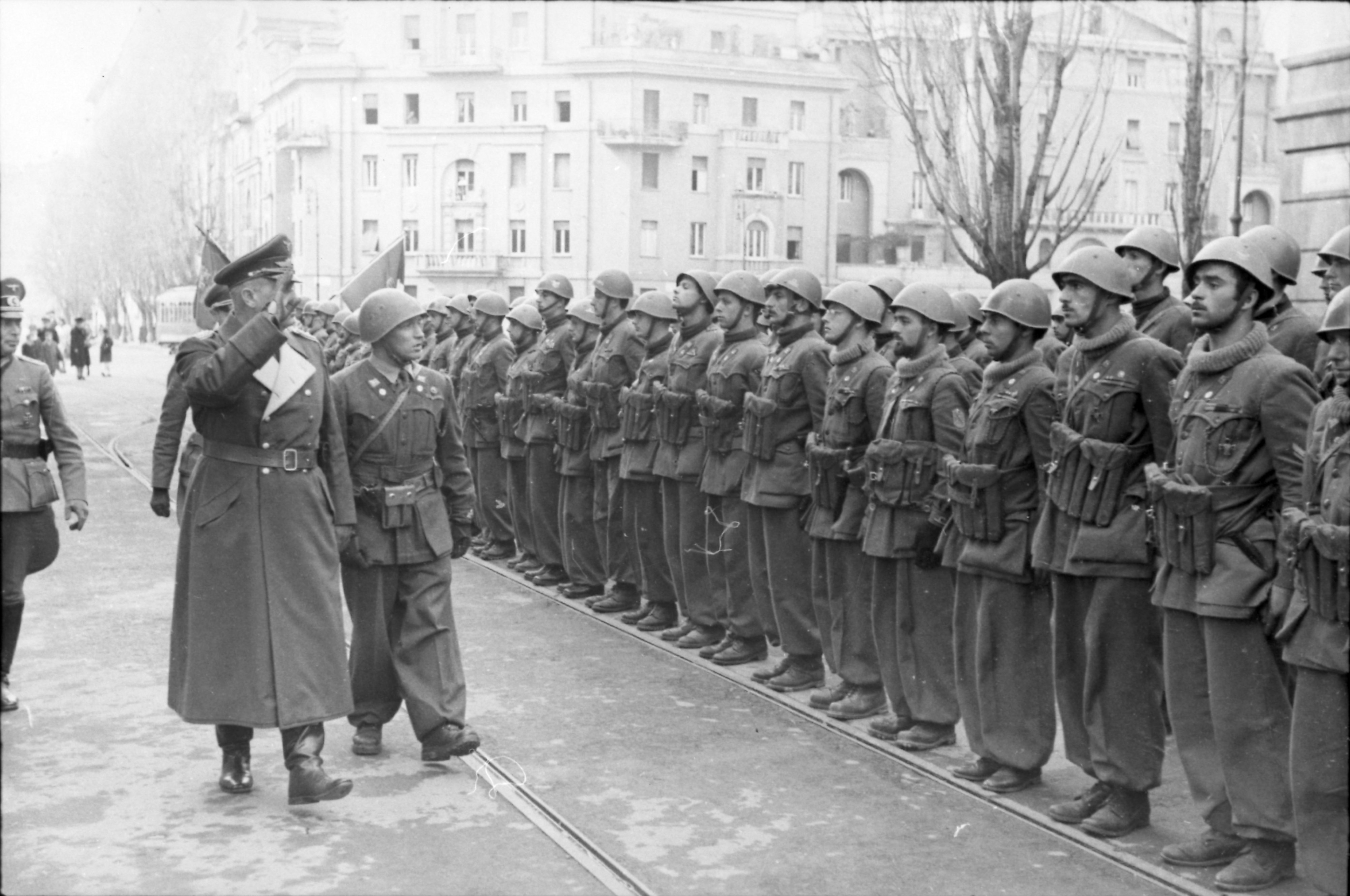 Roma, Italia, marzo 1944. Il generale della Luftwaffe Kurt Mälzer ispeziona truppe della Decima MAS (Repubblica Sociale Italiana), schierate in viale Carso, presso piazza Bainsizza, rione Prati, in occasione del loro dispiegamento sul fronte della testa di ponte alleata ad Anzio - Nettuno a sud di Roma. Information added by Wikimedia users.Rome, Italy, March 1944. General der Luftwaffe Kurt Mälzer (see here) inspecting Italian troops of the X MAS (belonging to the RSI Navy, and fighting as allied of the Germans) standing in viale Carso near piazza Bainsizza (Prati district, see here), around the time this unit was deployed to counter the Allied beachhead at Anzio - Nettuno, south of Rome. See also: File:Bundesarchiv_Bild_101I-311-0926-08,_Italien,_italienische_Soldaten,_deutscher_General.jpg